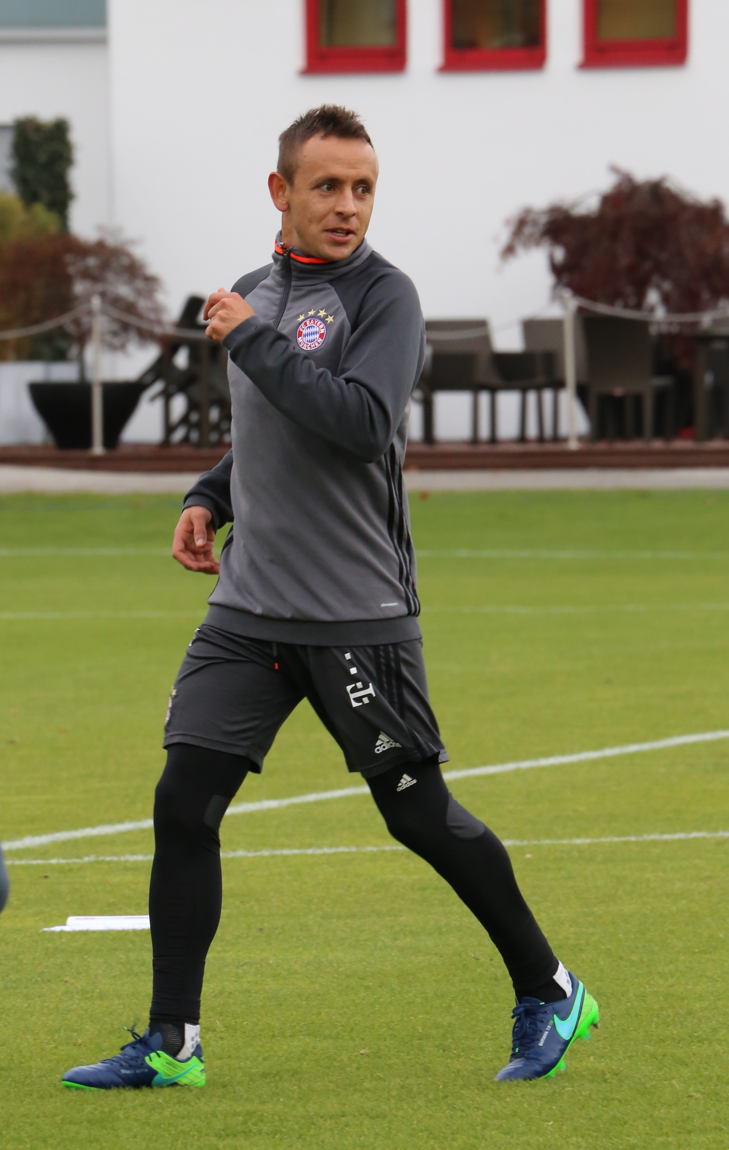 Rafinha beim Training auf dem Gelände des FC Bayern München (November 2016)